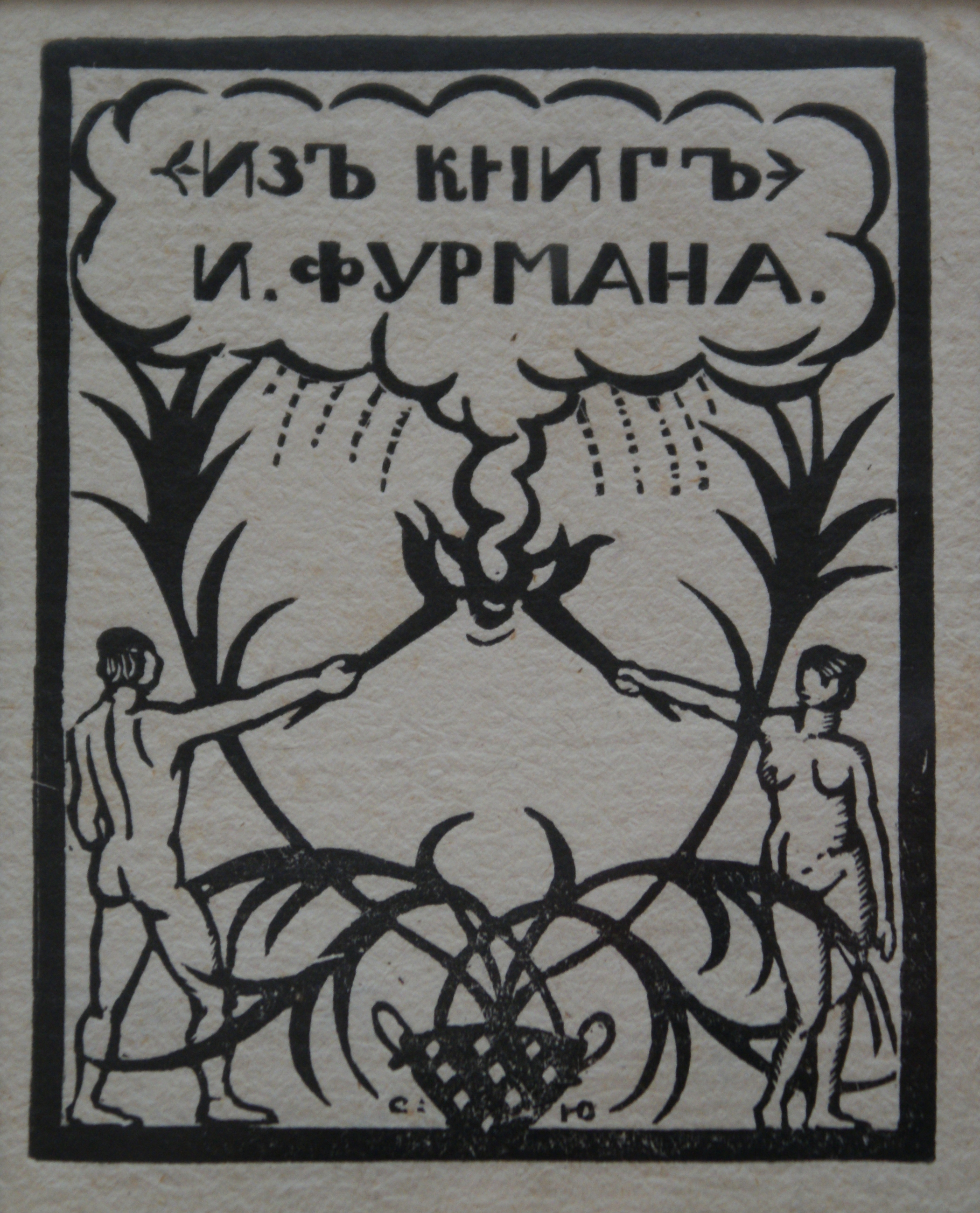 Экслібрыс І. П. Фурмана. Папера, ксілаграфія